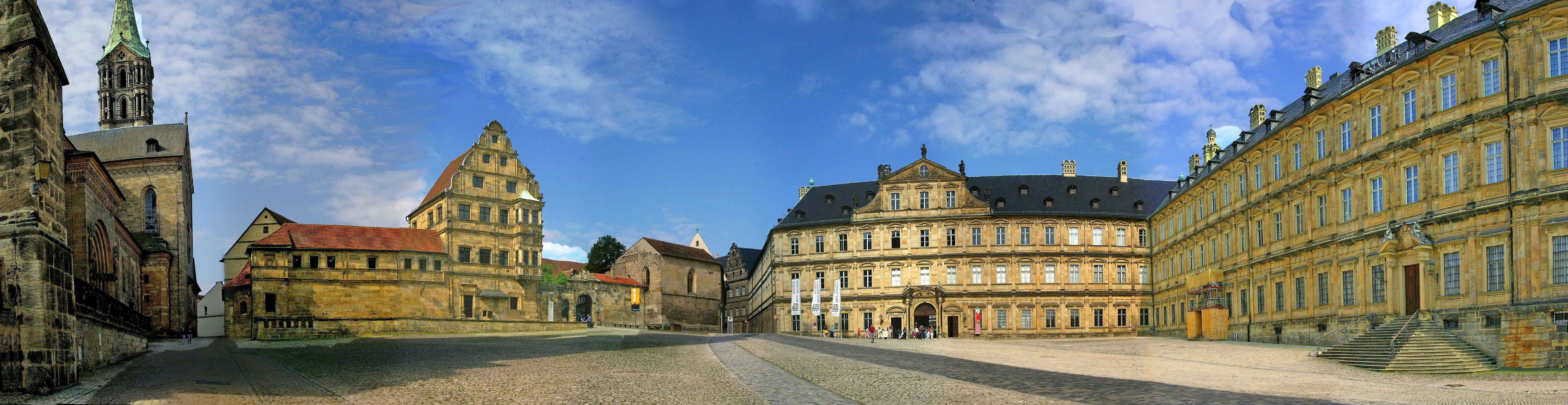 Bamberger Domplatz - Panorama